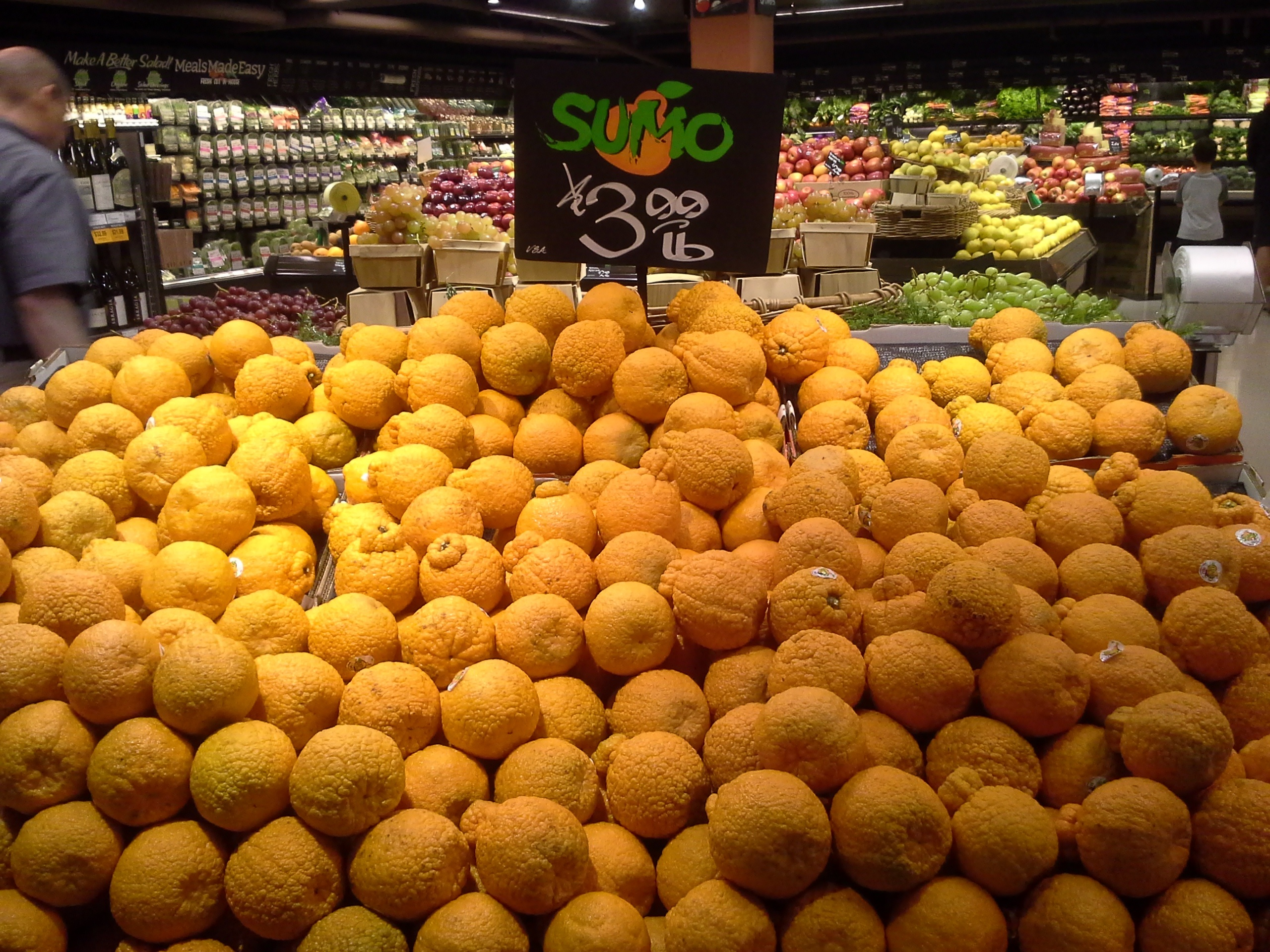 Amaso da dekoponoj (angle Sumos) en manĝaĵvendejo (Metropolitan Market Uptown) en Seatlo